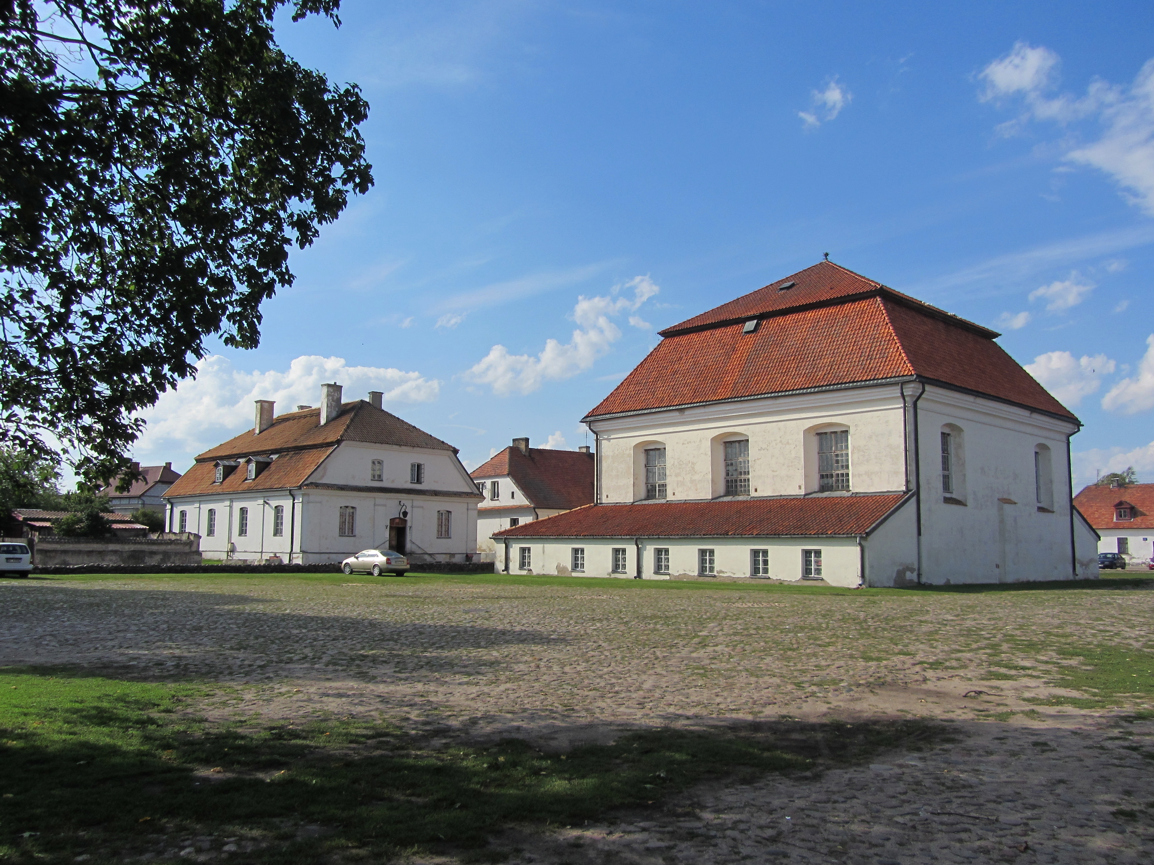 Tykocin, ul. Kozia 2 - od lewej: - mała synagoga (zabytek nr 172 [178] z 14.03.1962) - duża synagoga (zabytek nr 81 [87] z 24.01.1957)